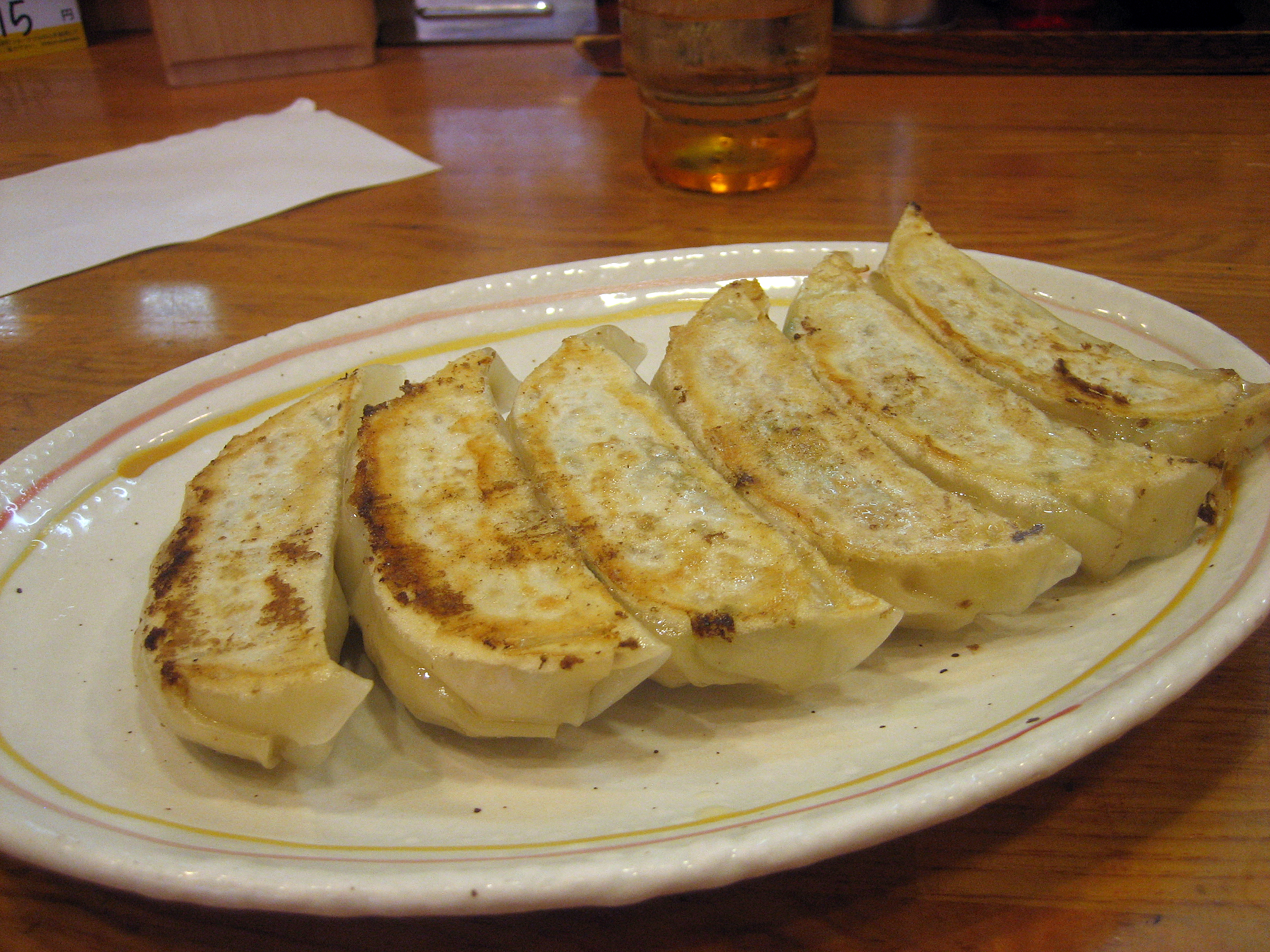 主に姫路市内の店舗の画像。そして飲食物。 京都餃子の王将の1人分の餃子。